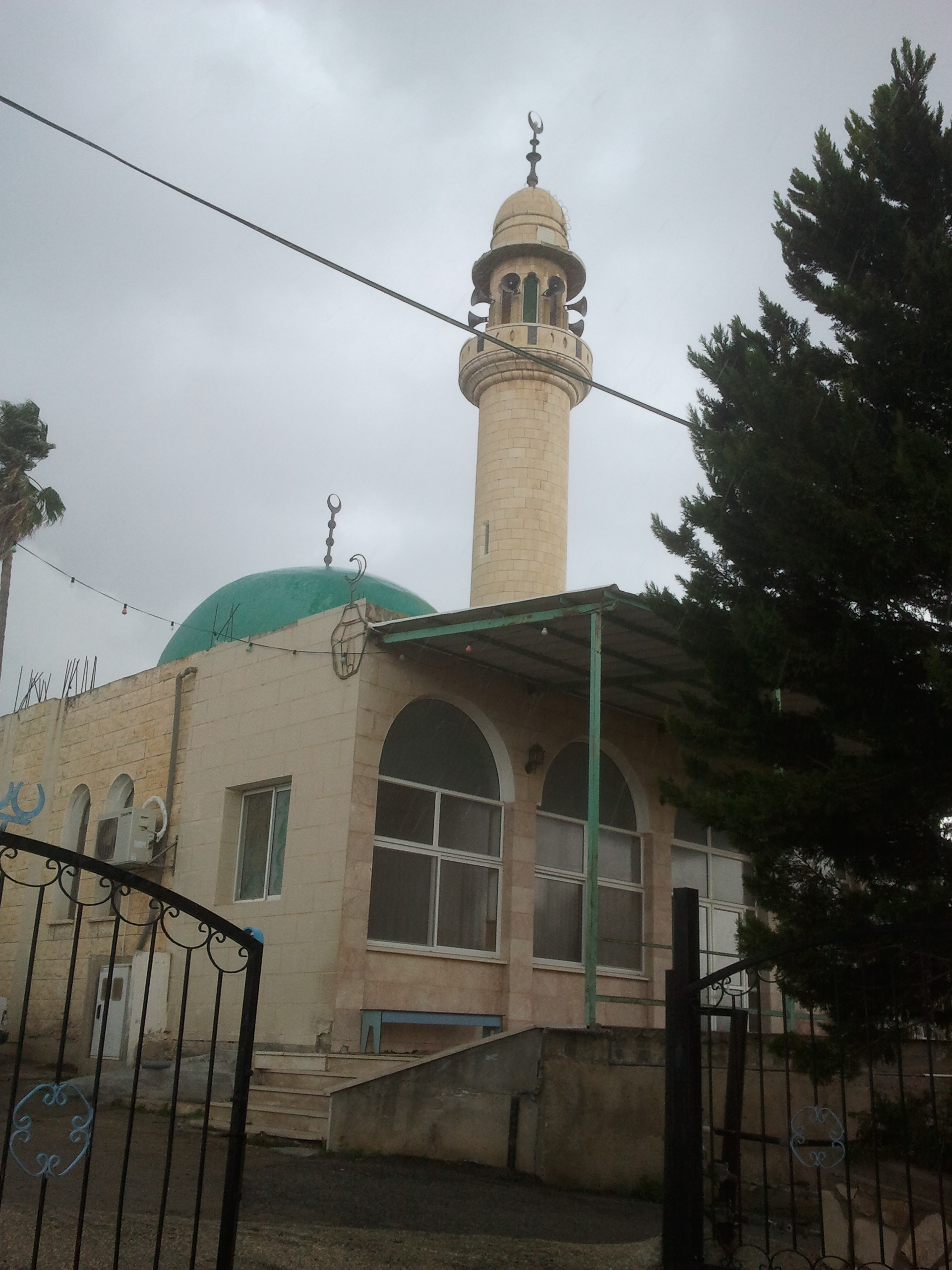 המסגד של נין כפר ערבי-ישראלי הנמצא צפונית-מזרחית לעיר עפולה